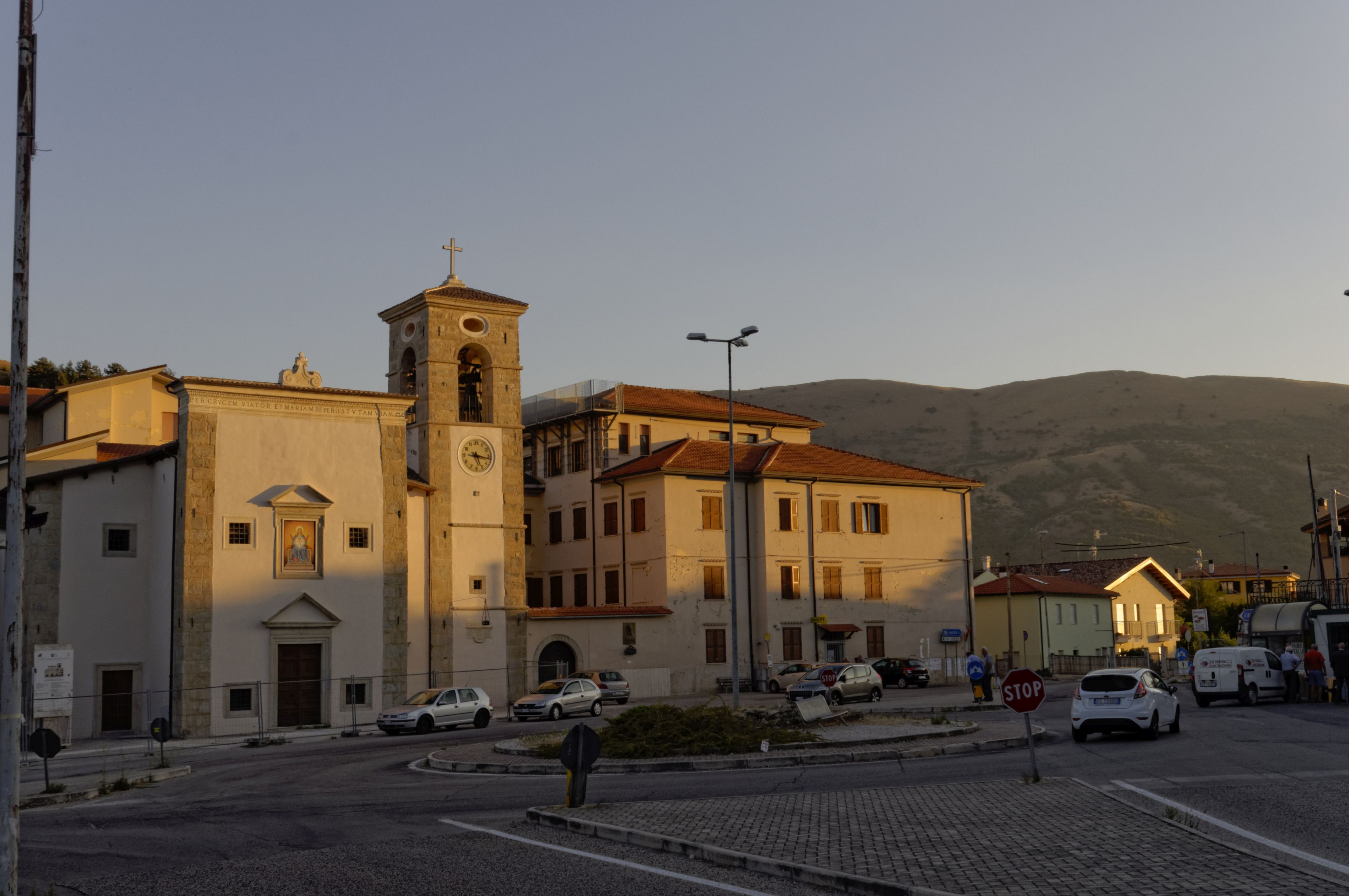 L'Aquila 2017 Dieses Foto entstand in Zusammenarbeit mit Stadtbesichtigungen.de Die Seiten Stadtbesichtigungen.de, der dazugehörige Reise Blog sowie die Facebookseite: Stadtbesichtigungen Rom dürfen dieses Bild für Ihre Veröffentlichungen ohne den Hinweis auf Wikipedia, Commons bzw der Lizenz verwenden. Die Verantwortlichen habe von mir (Ra Boe) die Originaldaten zur freien Verfügung übermittelt bekommen.